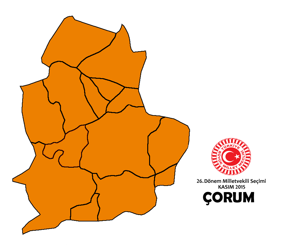 Kasım 2015 seçimleri